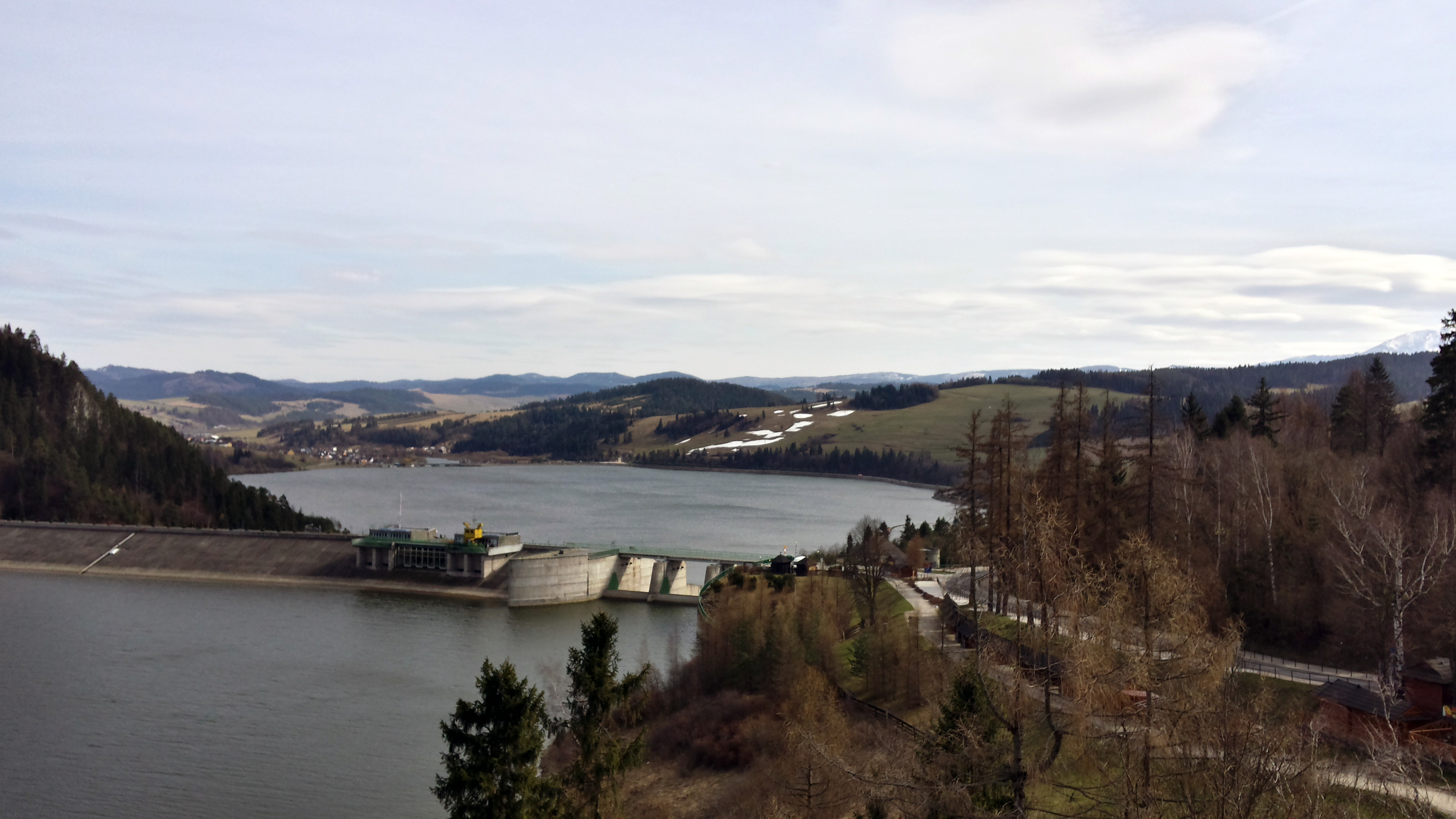 Widok z zamku w Niedzicy na Jezioro Czorsztyńskie